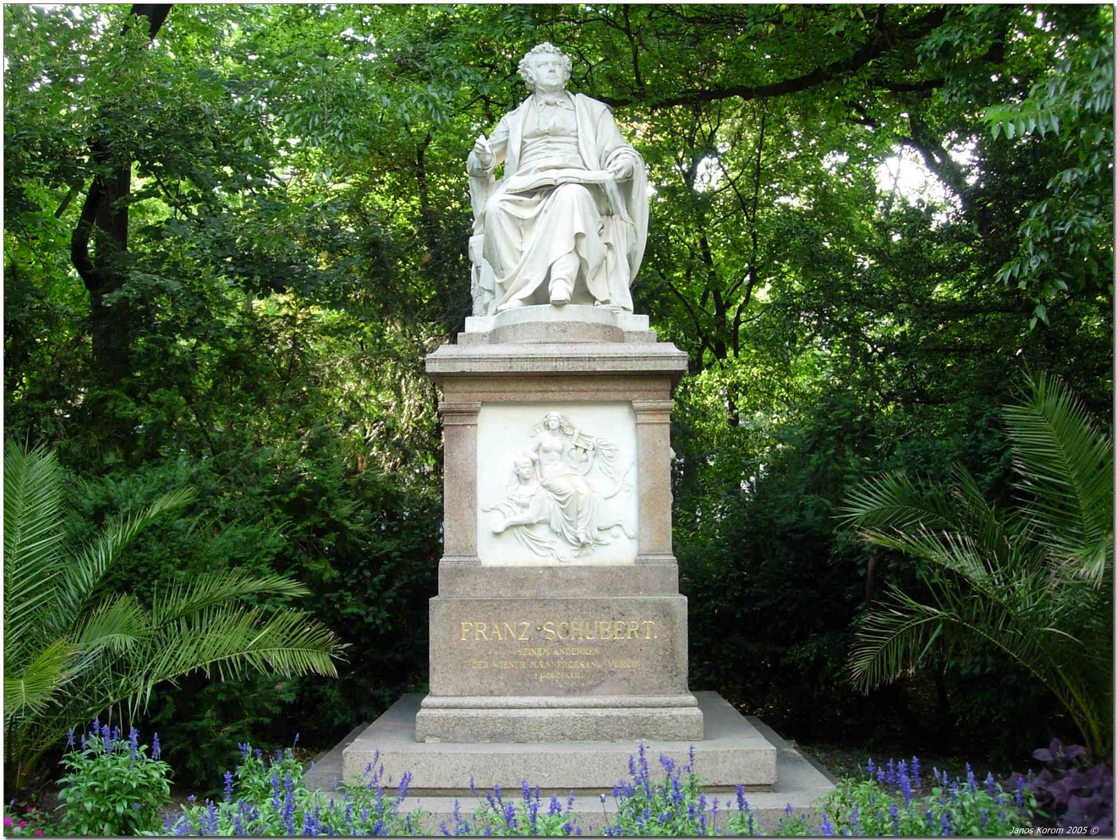 Stadtpark